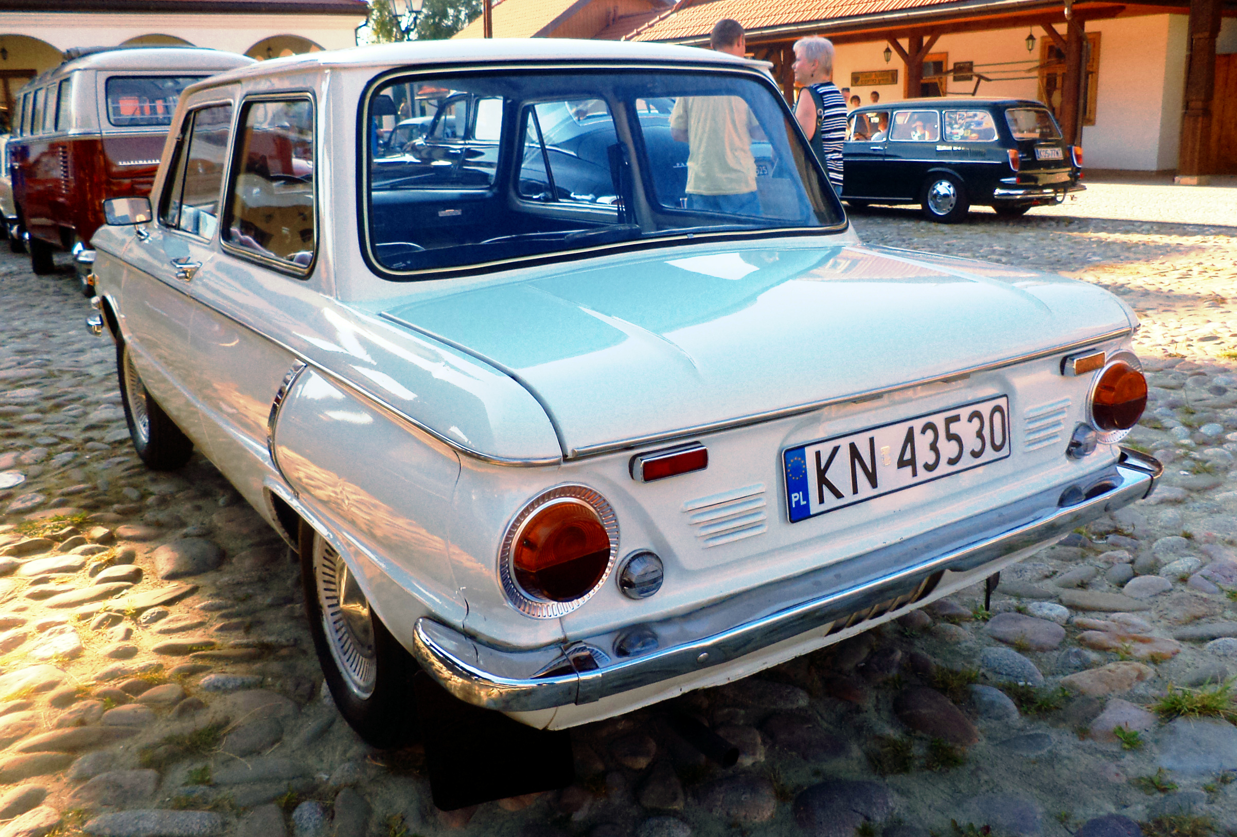 ZAZ 968 "Zaporożec" podczas V Zlotu Samochodów Zabytkowych "Retro" w Nowym Sączu.